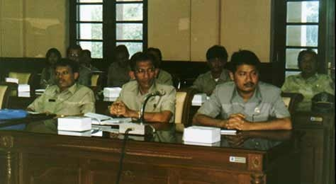 Agus Sutondo Rapat Tim Pansus RTRW Kota Depok 2000-2010